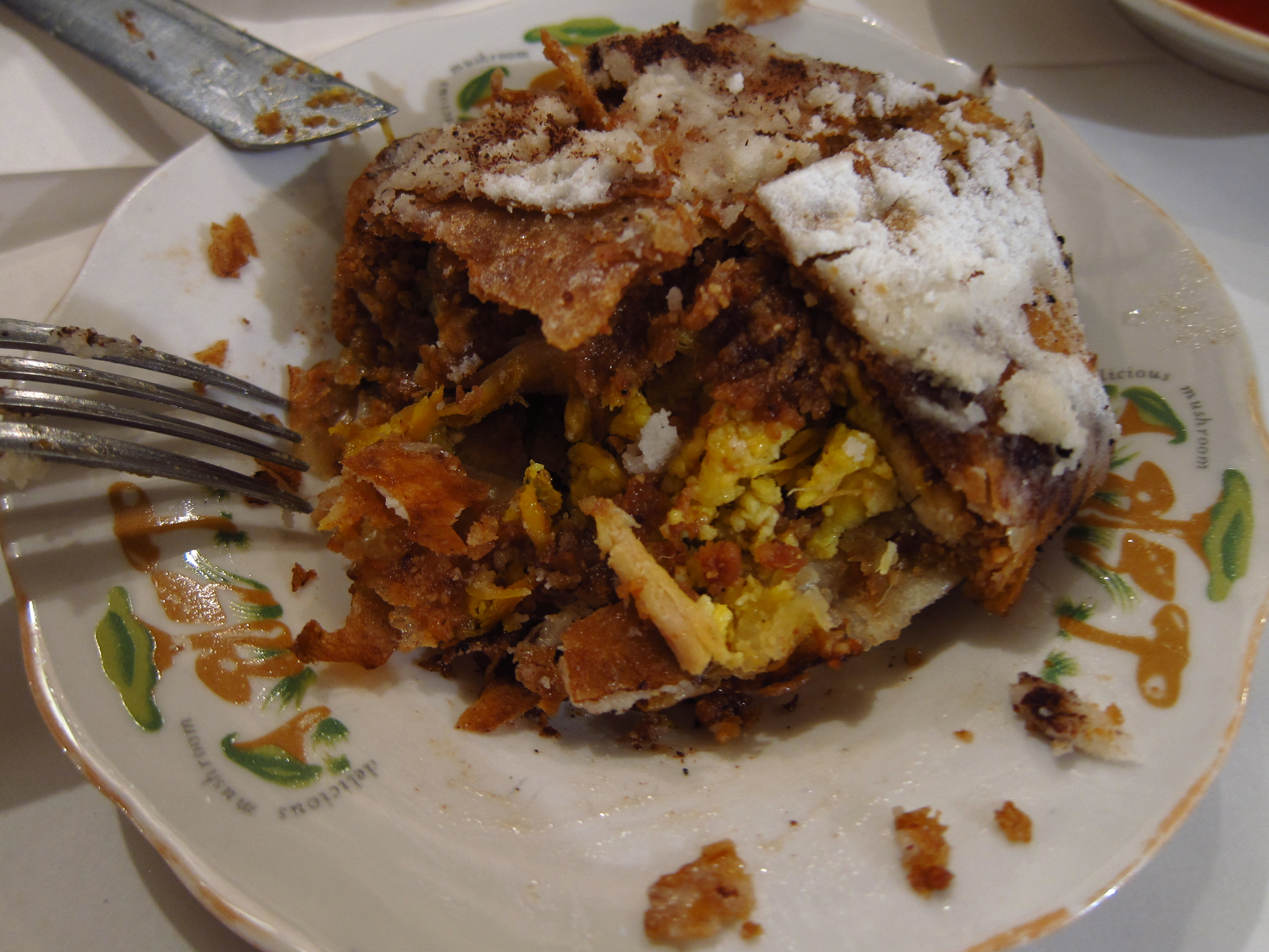 Pastilla au poulet et sucre glace